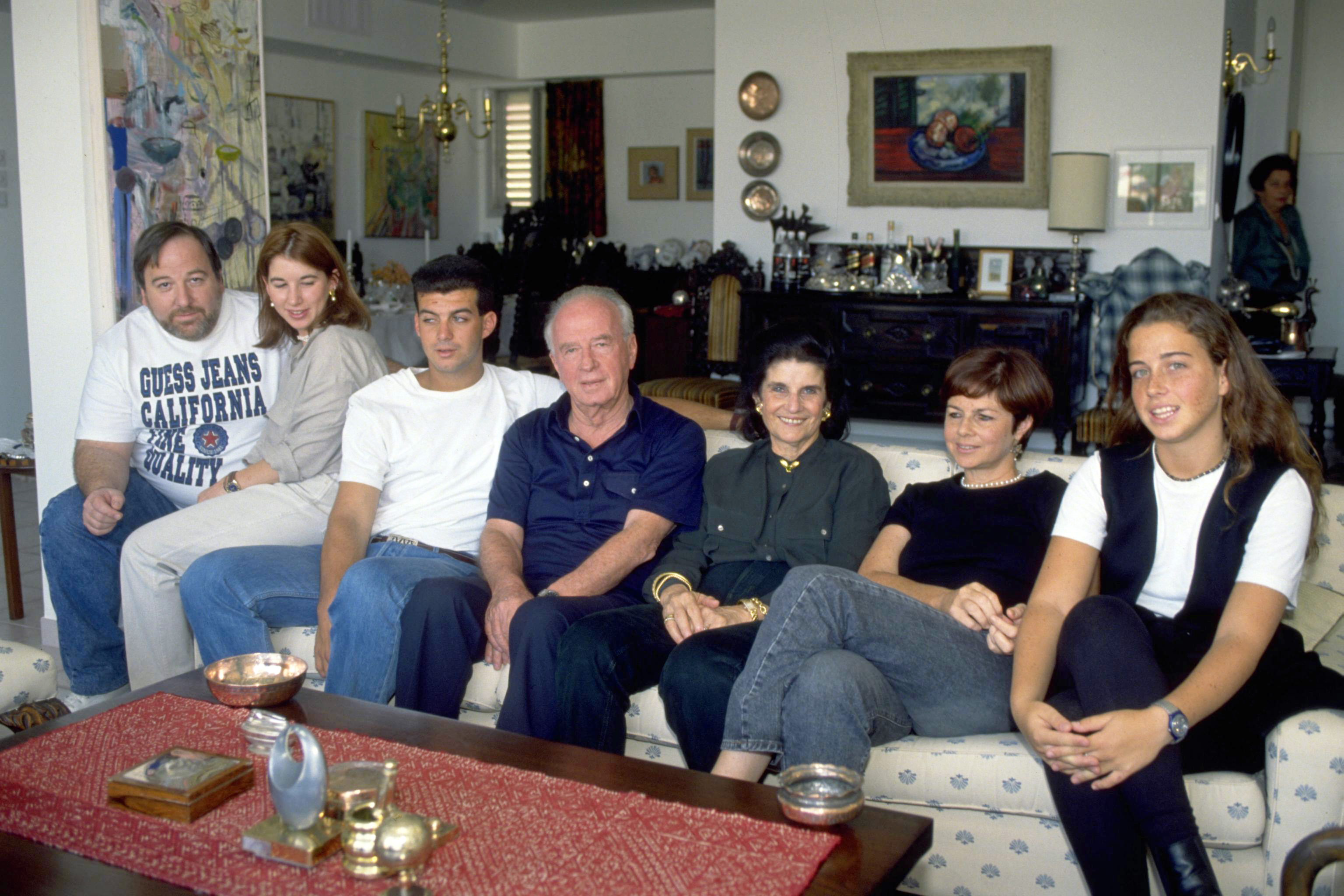 PRIME MINISTER YITZHAK RABIN, HIS WIFE LEA, DAUGHTER DALIA, SON IN LAW AVI & THEIR GRANDCHILDREN AT THE RABIN FAMILY APARTMENT IN RAMAT AVIV, TEL AVIV. 14/11/1992. ראש הממשלה יצחק רבין בחוג משפחתו בדירתם ברמת אביב בתל אביב. מימין לשמאל, הנכדה נועה בן ארצי, הבת דליה פילוסוף, הרעייה לאה רבין, רהמ יצחק רבין, הנכד יונתן בן ארצי, הנכדה קארין פילוסוף והחתן אבי פילוסוף.